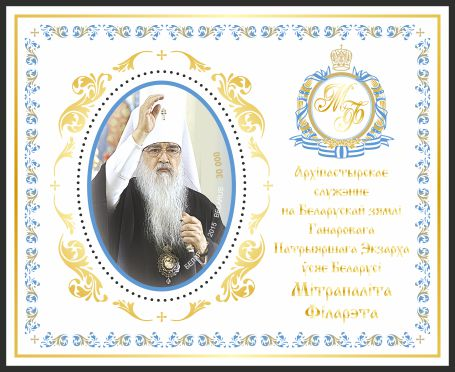 Архіпастырскае служэнне на Беларускай зямлі Ганаровага Патрыяршага Экзарха ўсяе Беларусі Мітрапаліта Філарэта